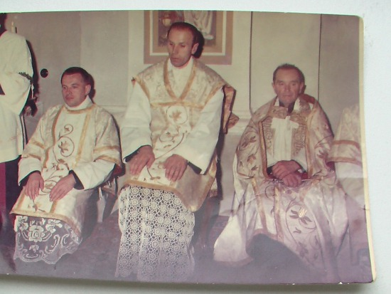 Emil Dorničák uprostřed